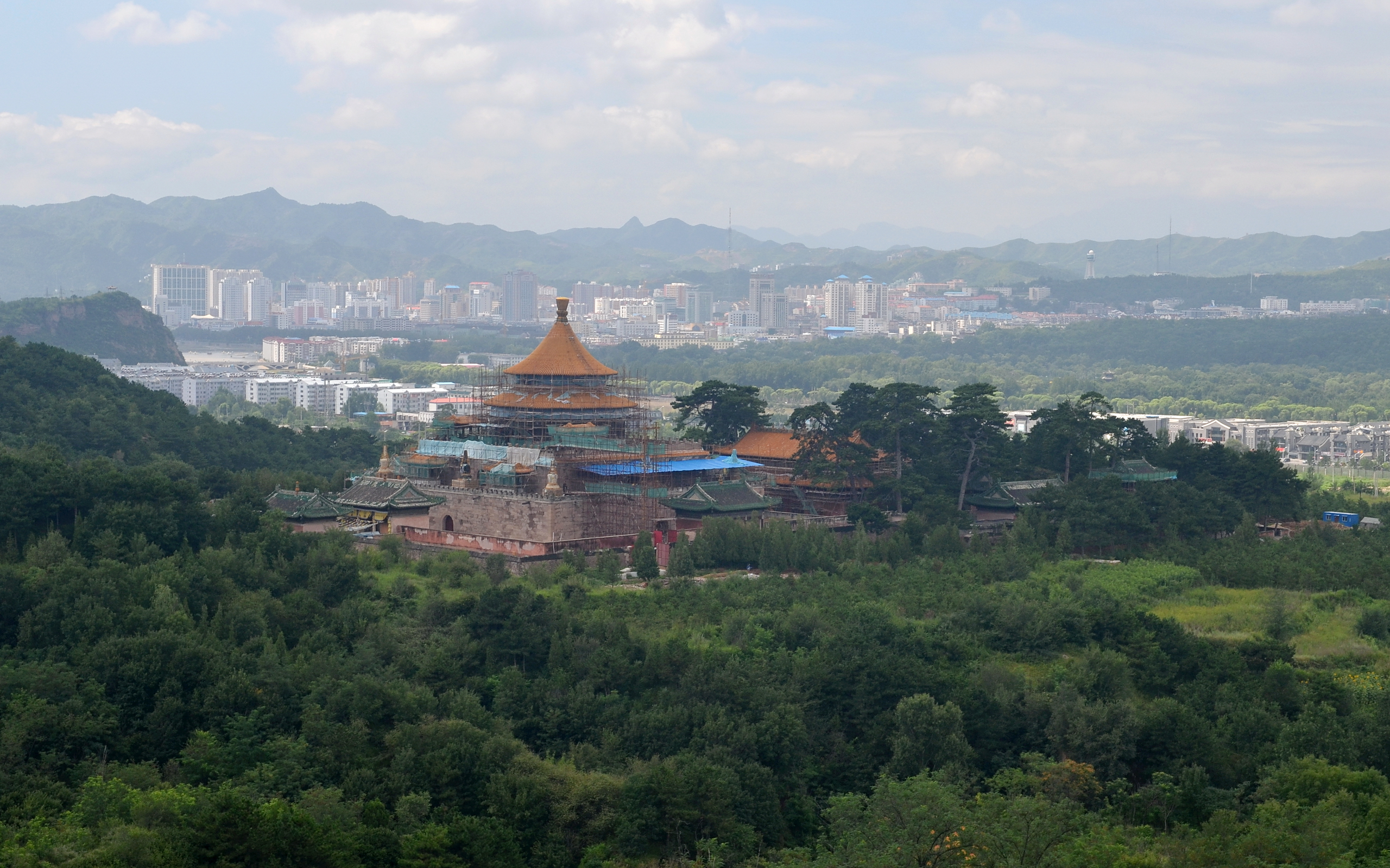 承德普乐寺,正进行维修工程